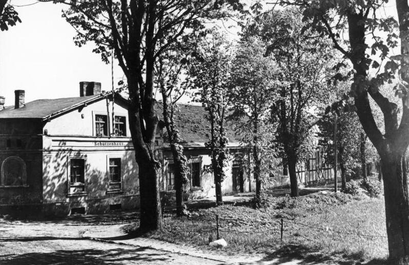 Schützenhaus in Pasewalk Schützenhaus in Pasewalk, wo Hitler Ende des Ersten Weltkriegs erblindet gelegen hat